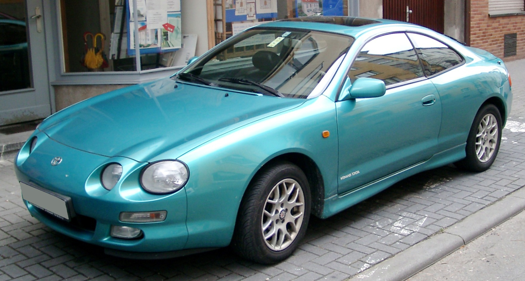 Toyota Celica 2.0 GT (ST202) shown in Bright Turquoise Metallic (colour code 756).